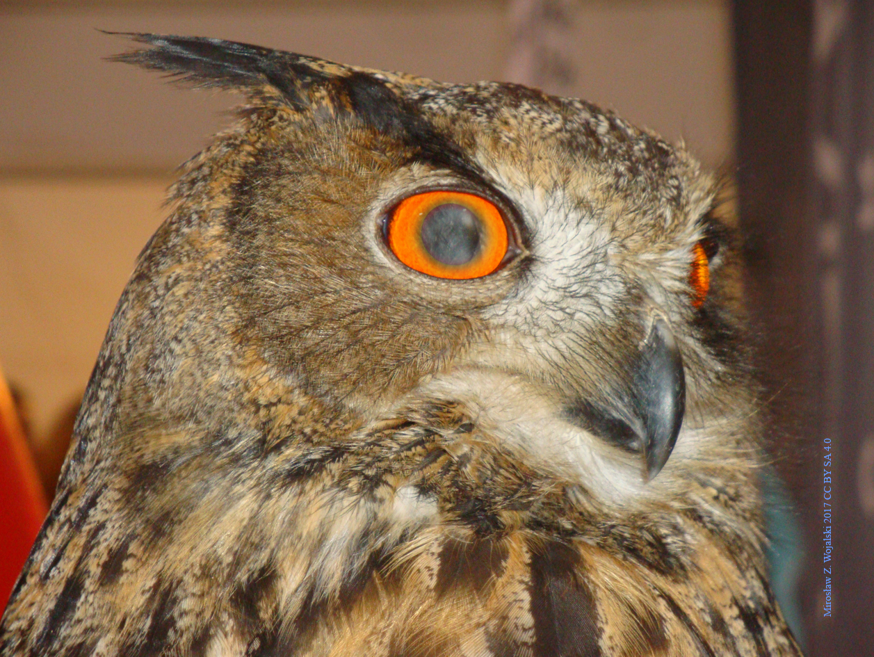 XXIII Targi Turystyczne 2017 Łódź Głowa puchacza, największej sowy Europy reklamującego "Przygodę z przyrodą" w Lądku-Zdroju